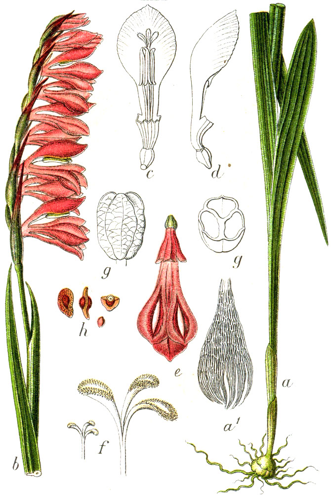 Gladiolus imbricatus L. Original Caption Dichtblütiger Gladiolus, Gladiolus imbricatus